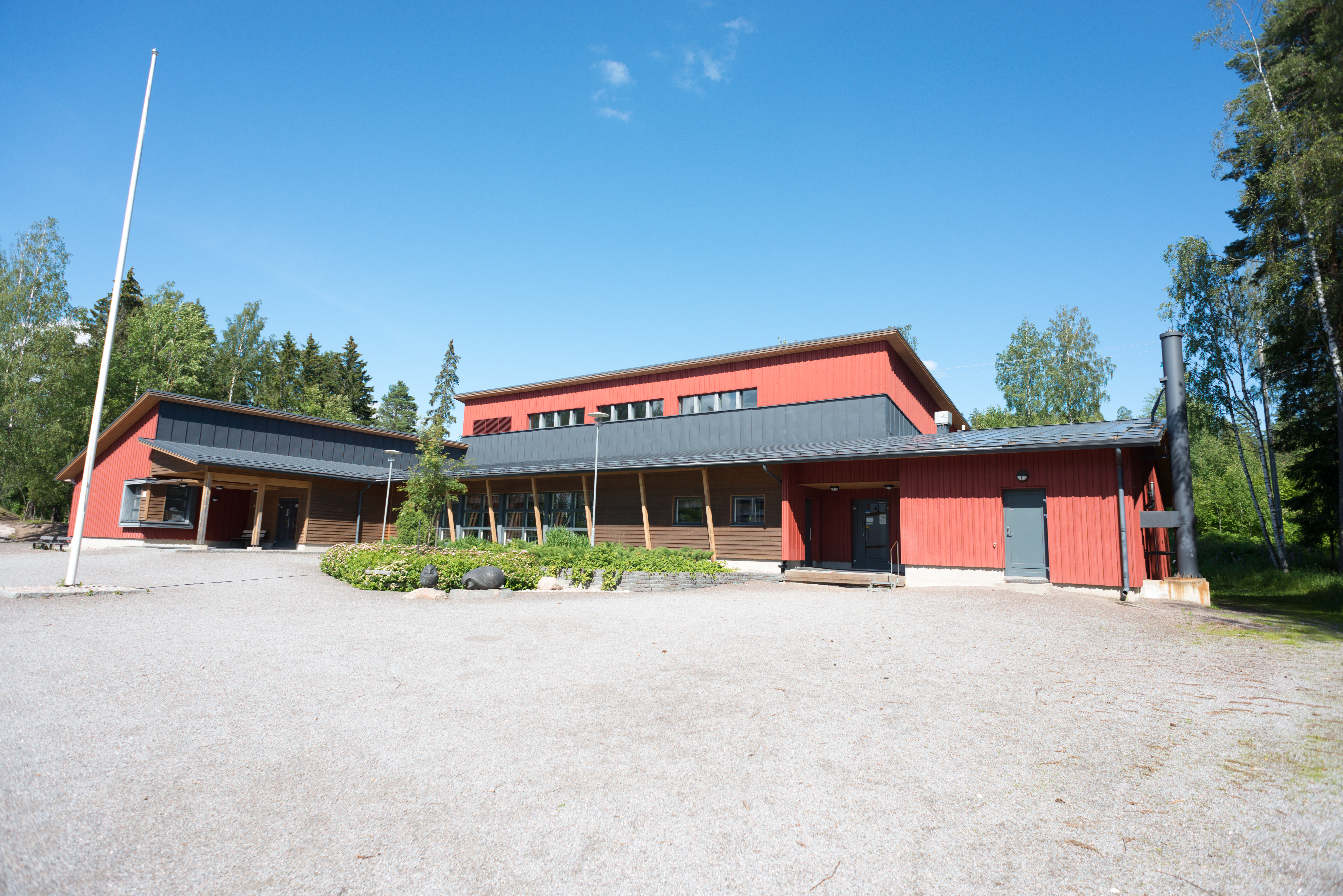 Sirkkulan koulu Salossa